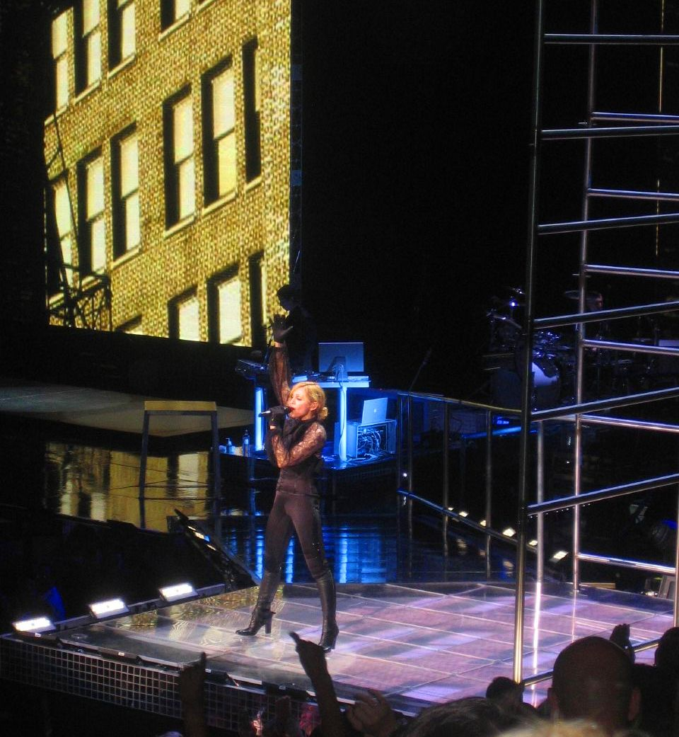 jump